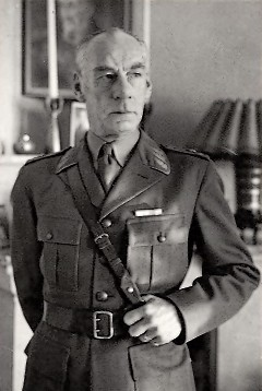 Swedish general Hjalmar Fredrik Falk (1884-1954)